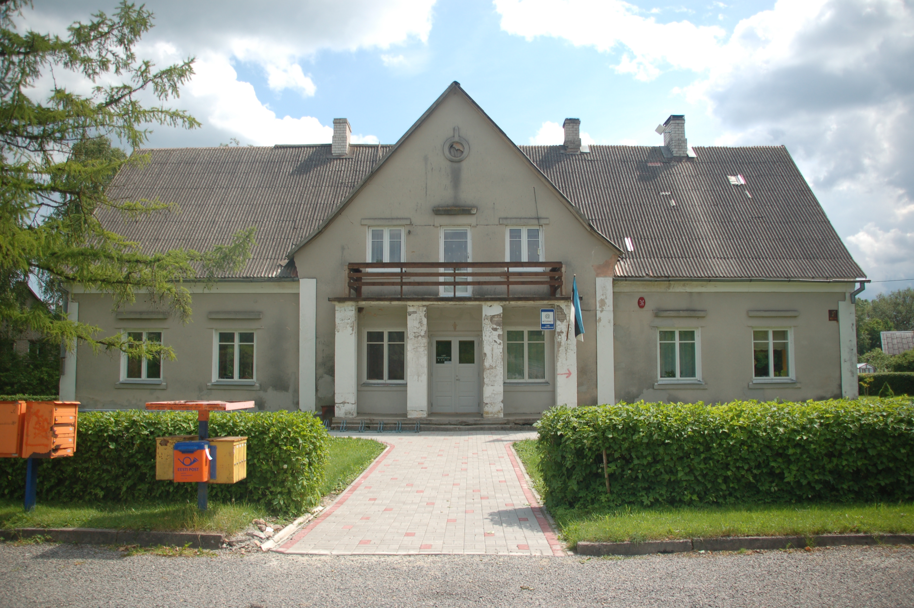 Luke raamatukogu